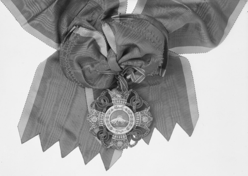 Wstęga i odznaka II klasy Orderu Pahlawich